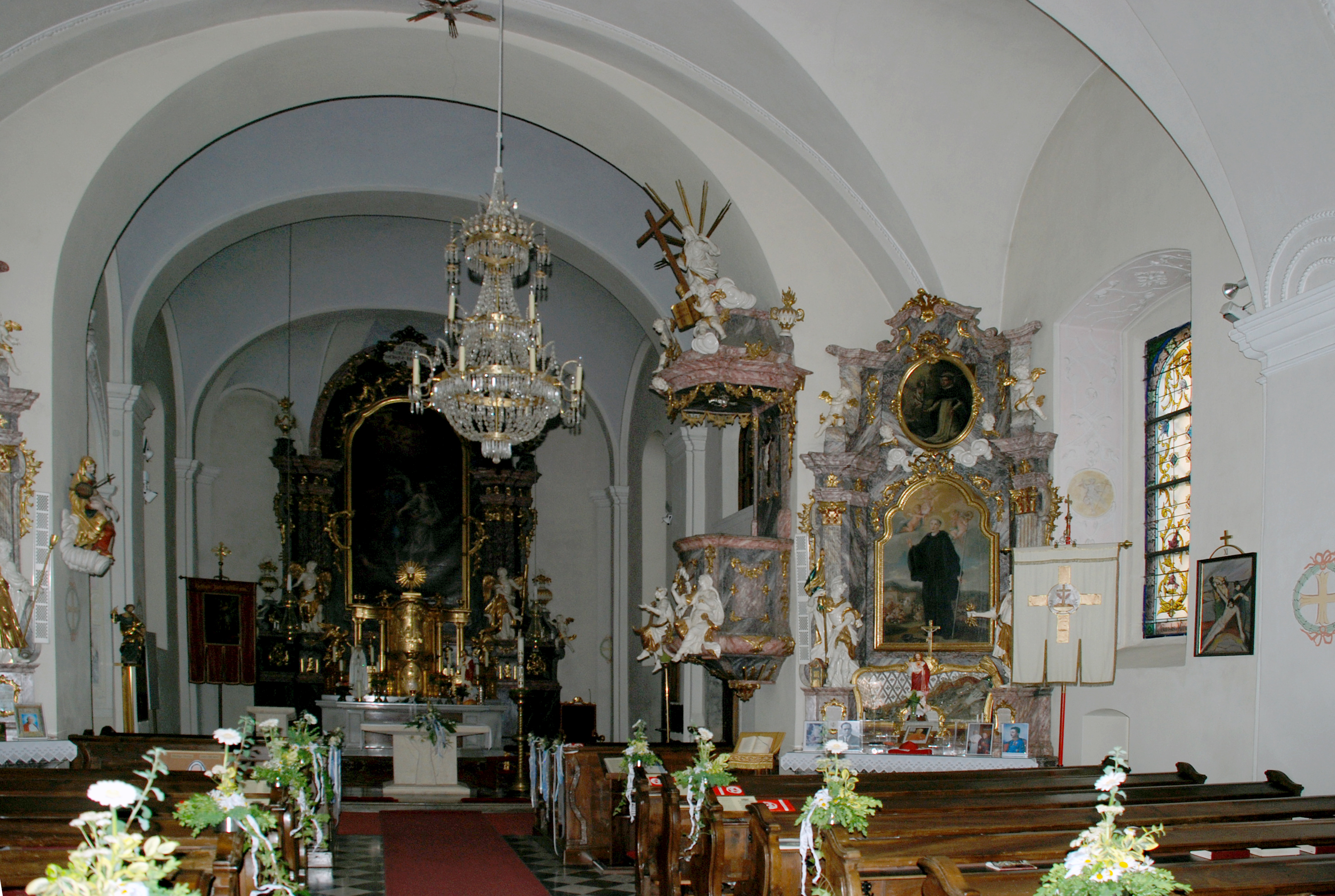 St Peter im Sulmtal, Steiermark, Österreich: Kircheneinrichtung